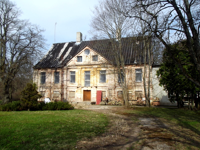 Vecapguldes muiža